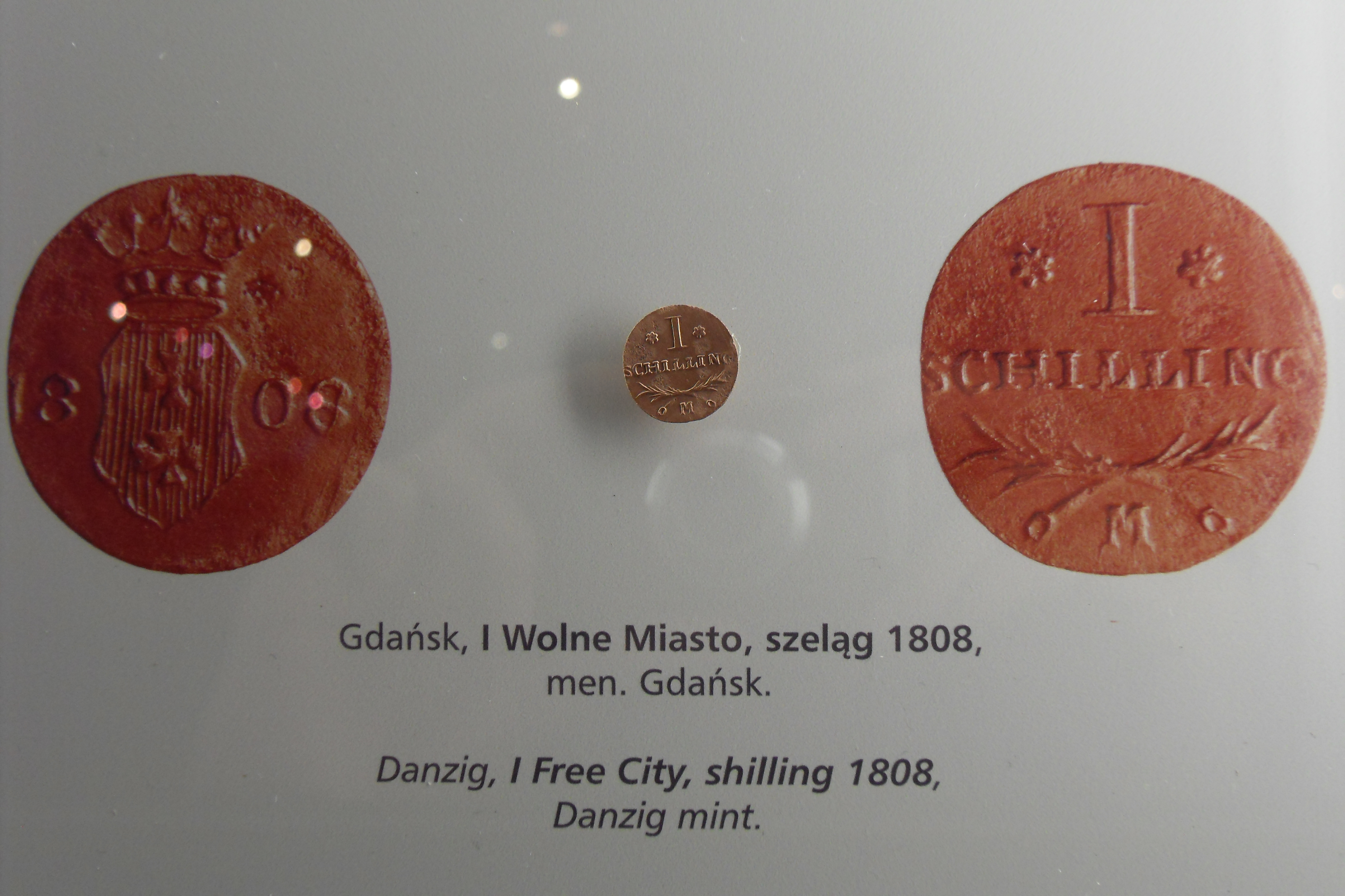 Gdańsk, Wyspa Spichrzów. Ul. Chmielna, spichlerz Błękitny Baranek, zbiory - Gdańsk, I Wolne Miasto, szeląg z 1808 r.